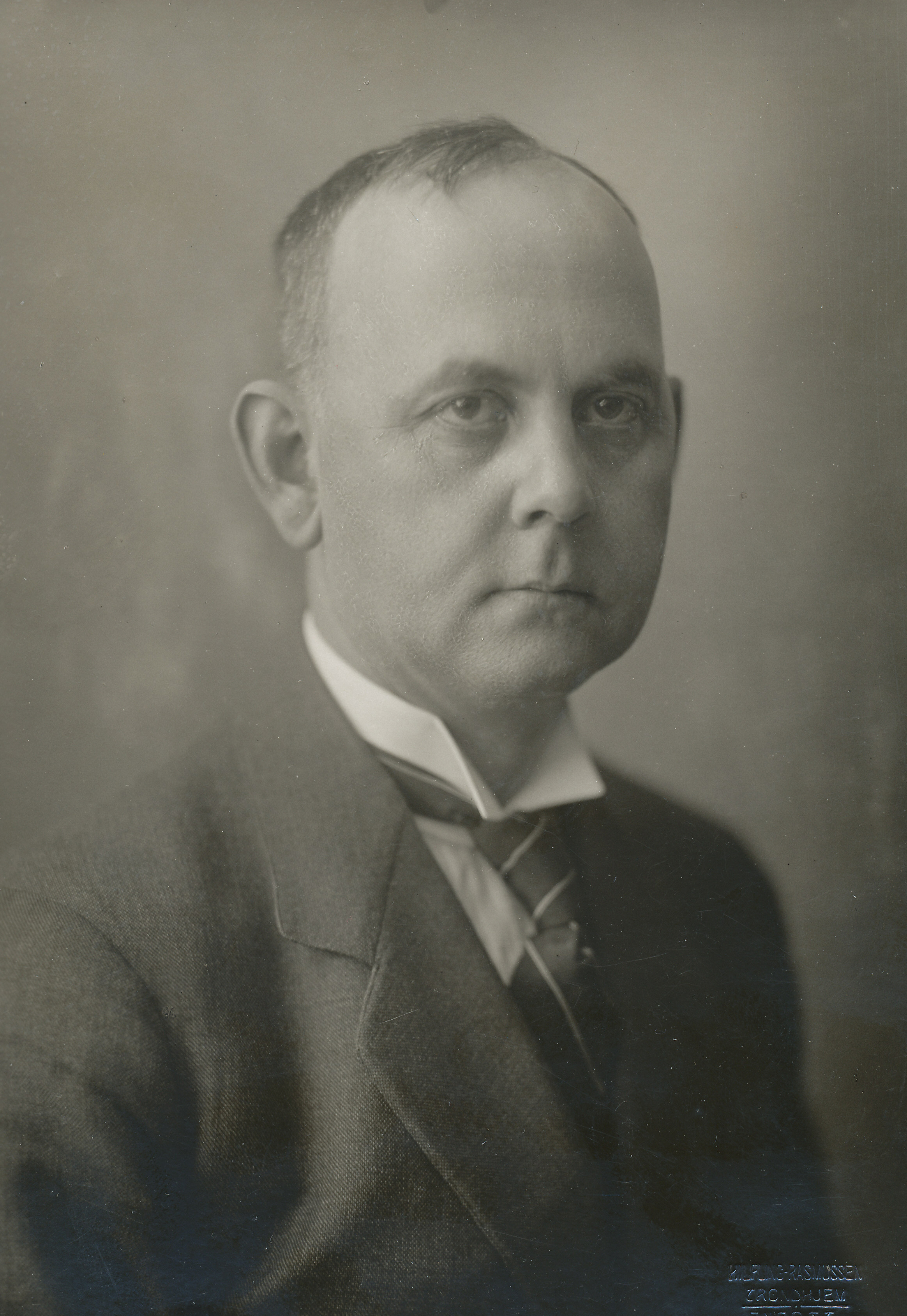 Format: Fotopositiv Dato / Date: ca. 1930 Fotograf / Photographer: Jens Carl Frederik Hilfling-Rasmussen (1869 - 1941) Sted / Place: Trondheim Wikipedia: Sverre Pedersen (1882 - 1971) Digitalarkivet: Sverre Pedersens husstand i Tidemands gate 24 (Thjems kommunale Folketelling 1925) Digitalarkivet: Sverre Pedersens karakterer ved Trondhjems Tekniske Læreanstalt (uteksaminert 1901) Eier / Owner Institution: Trondheim byarkiv, The Municipal Archives of Trondheim Arkivreferanse / Archive reference: Tor.H41.B25.F1745